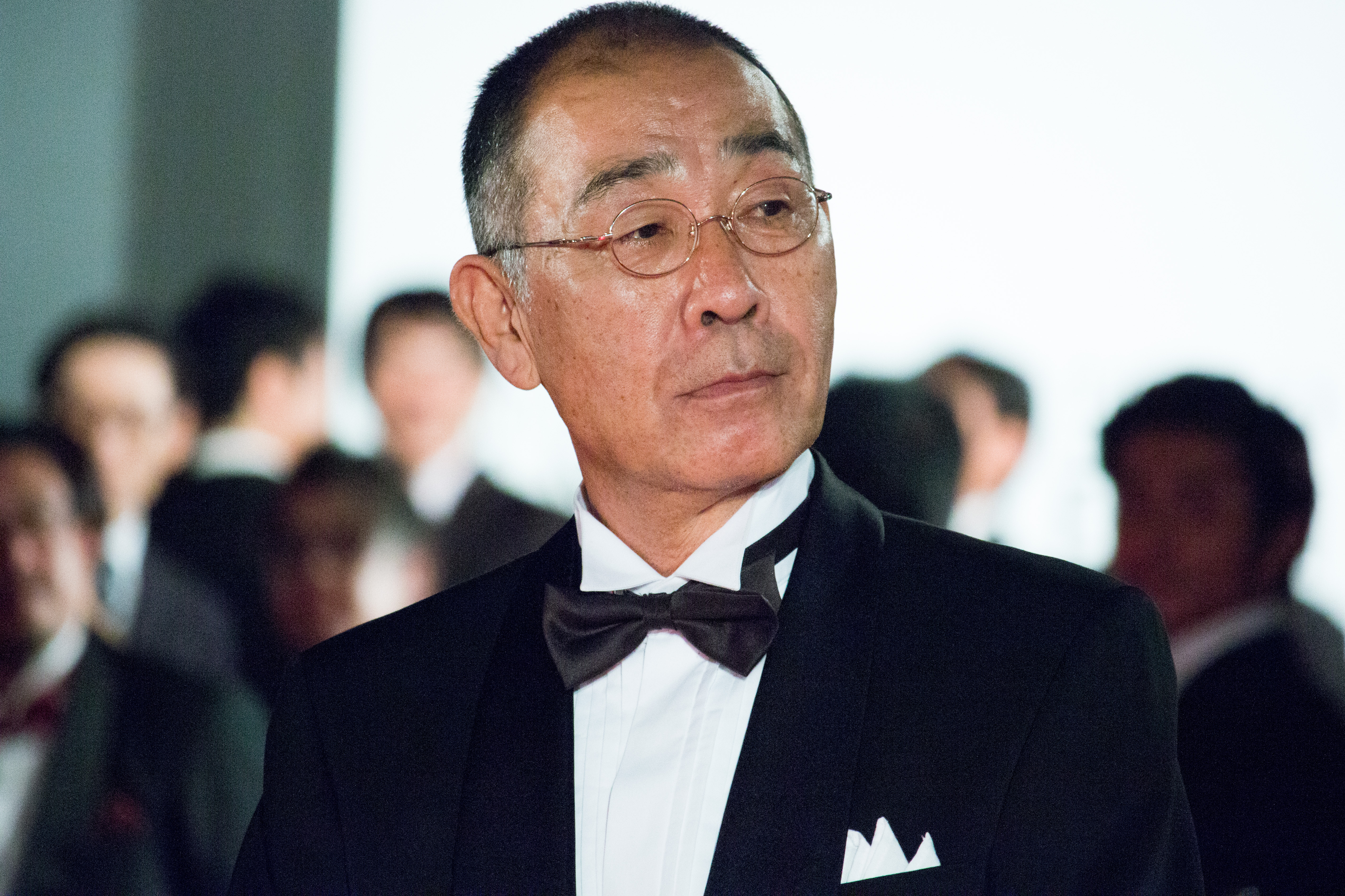 第28回 東京国際映画祭 オープニングセレモニー でんでん (の・ようなもの のようなもの)